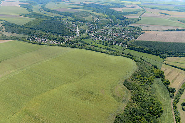 Káva, Várhegy